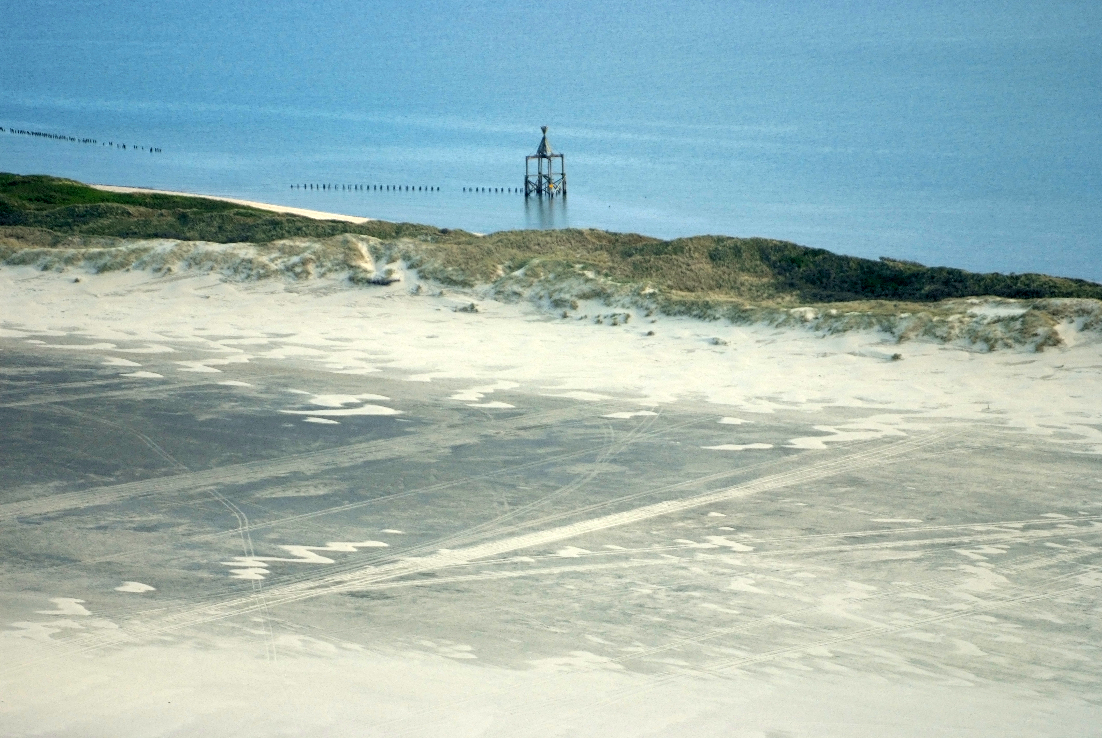 Wangerooge, alte Strandbake im Osten Die Bake mit dem Sanduhr-Toppzeichen wurde um 1875 auf einem Holzgerüst am Südoststrand von Wangerooge errichtet. Fotoflug vom Flugplatz Nordholz-Spieka über Bremerhaven, Wilhelmshaven und die Ostfriesischen Inseln bis Borkum